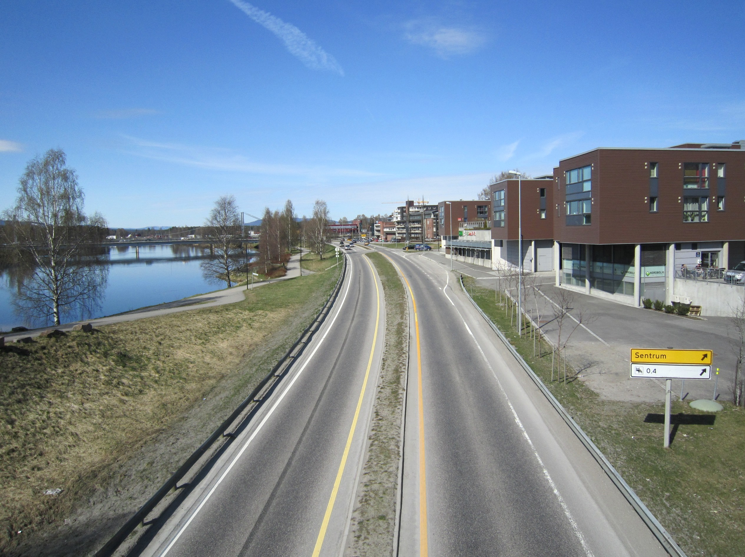 Riksvei 2 (tidligere riksvei 20) ved Elverum